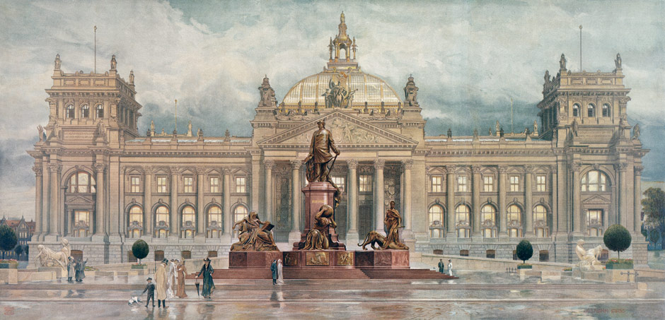 Reichstagsgebäude und Bismarckdenkmal in Berlin (Abendstimmung nach dem Regen), Lithographie, 118 x 57,5 cm, um 1910